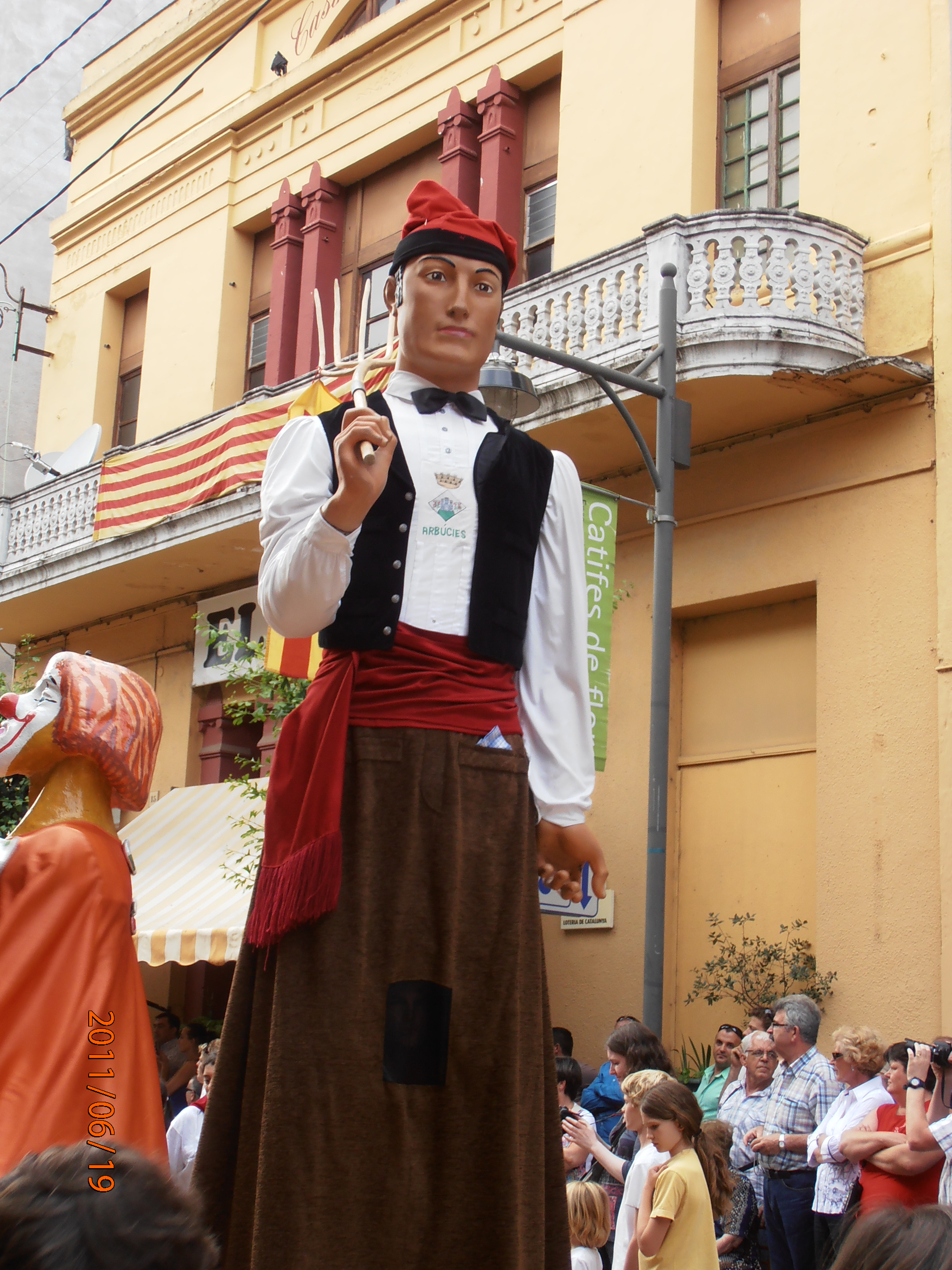 El gegant pasejant per l'enramada d'Arbúcies